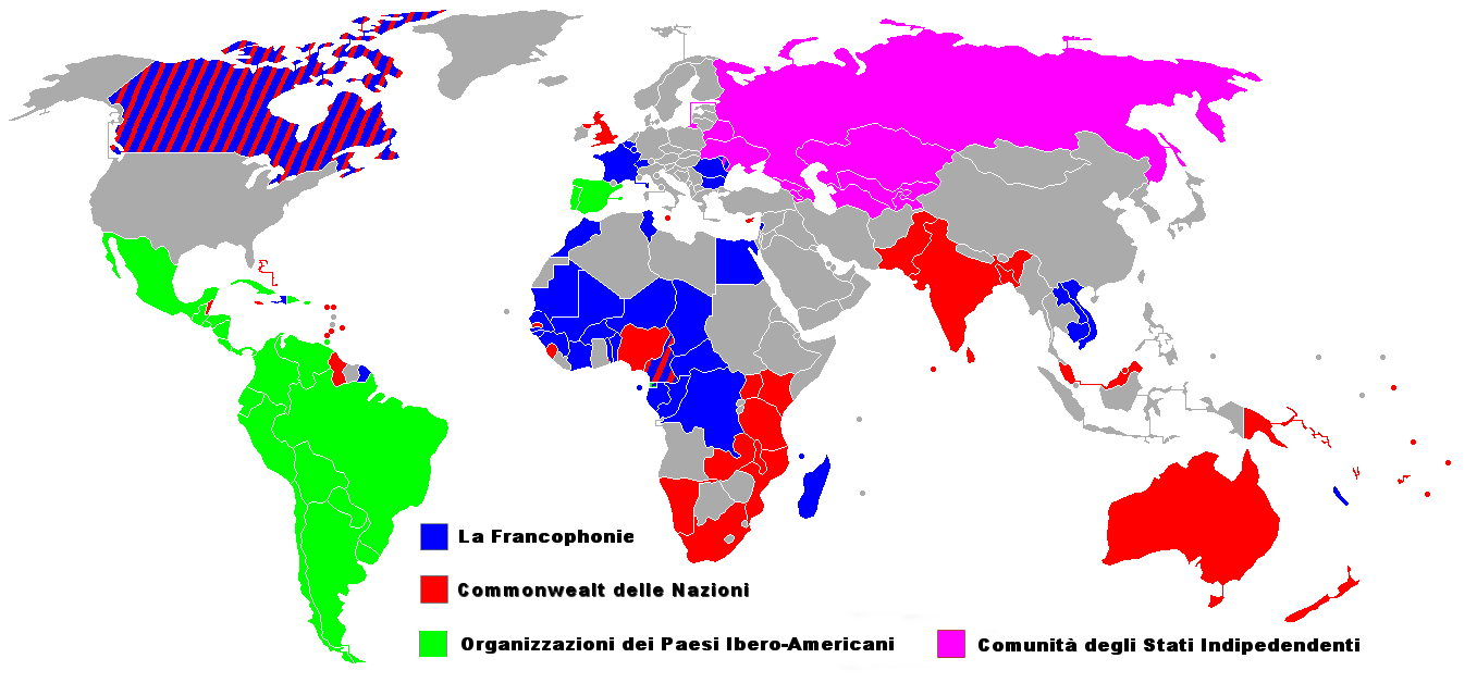 Cartina delle organizzazioni internazionali che raggruppano le nazioni ex colonie dei paesi europei o che hanno un legame culturale con esse.